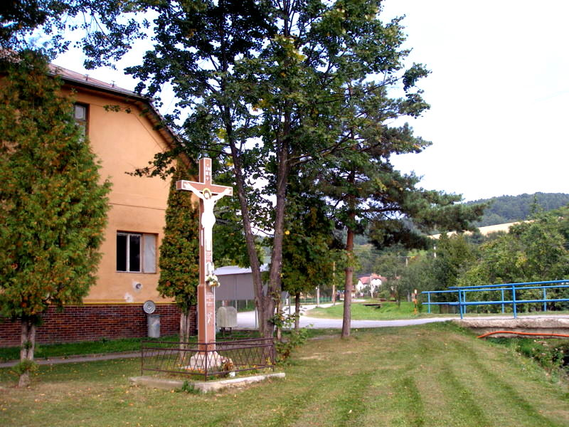 Zdravotnícke stredisko. Obec Sedlice pri Prešove. Slovensko.